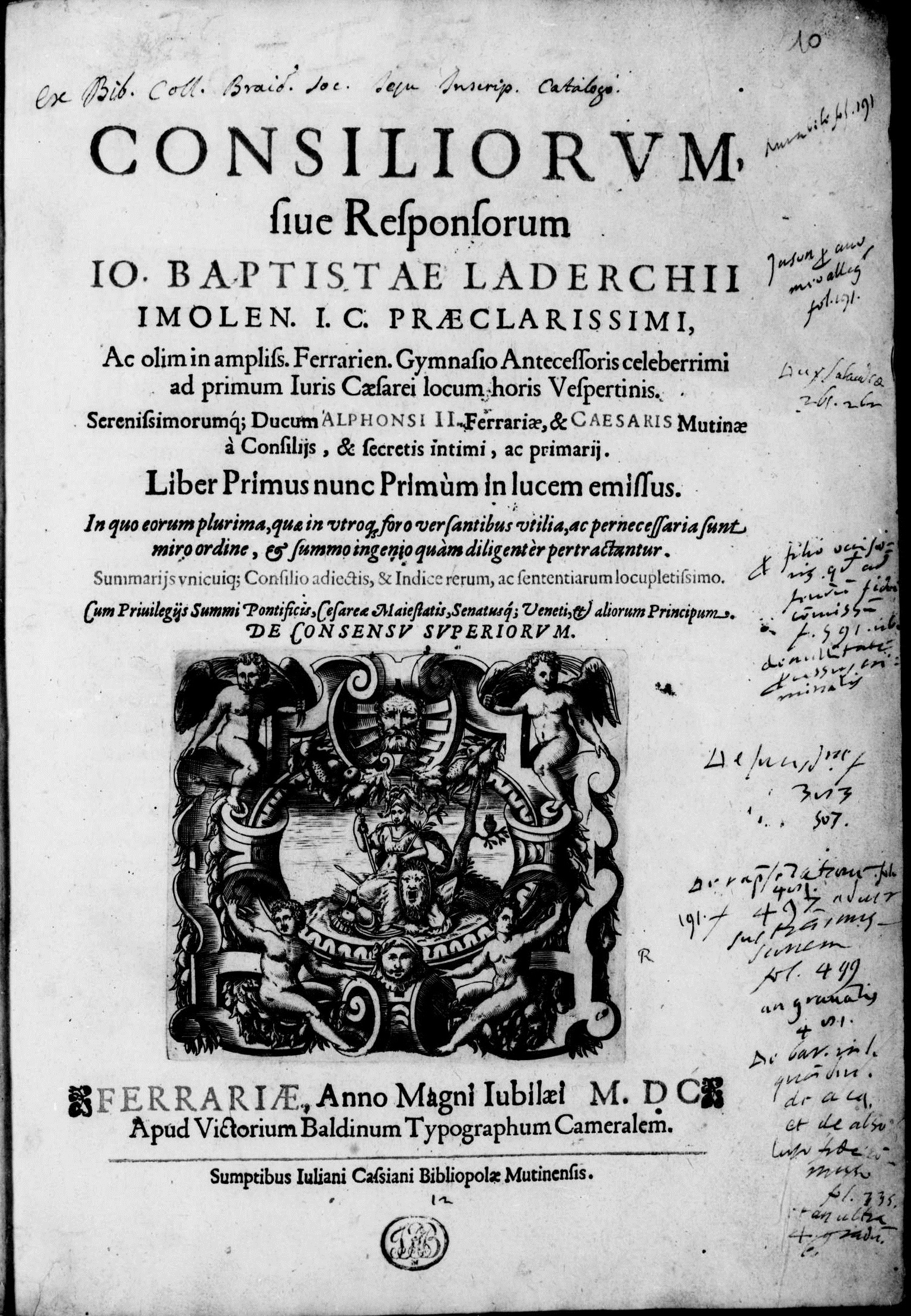 Frontespizio